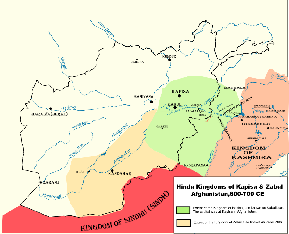 Carte montrant l'étendue des royaumes hindous de Kaboul et de Zabol dans la période 600-700